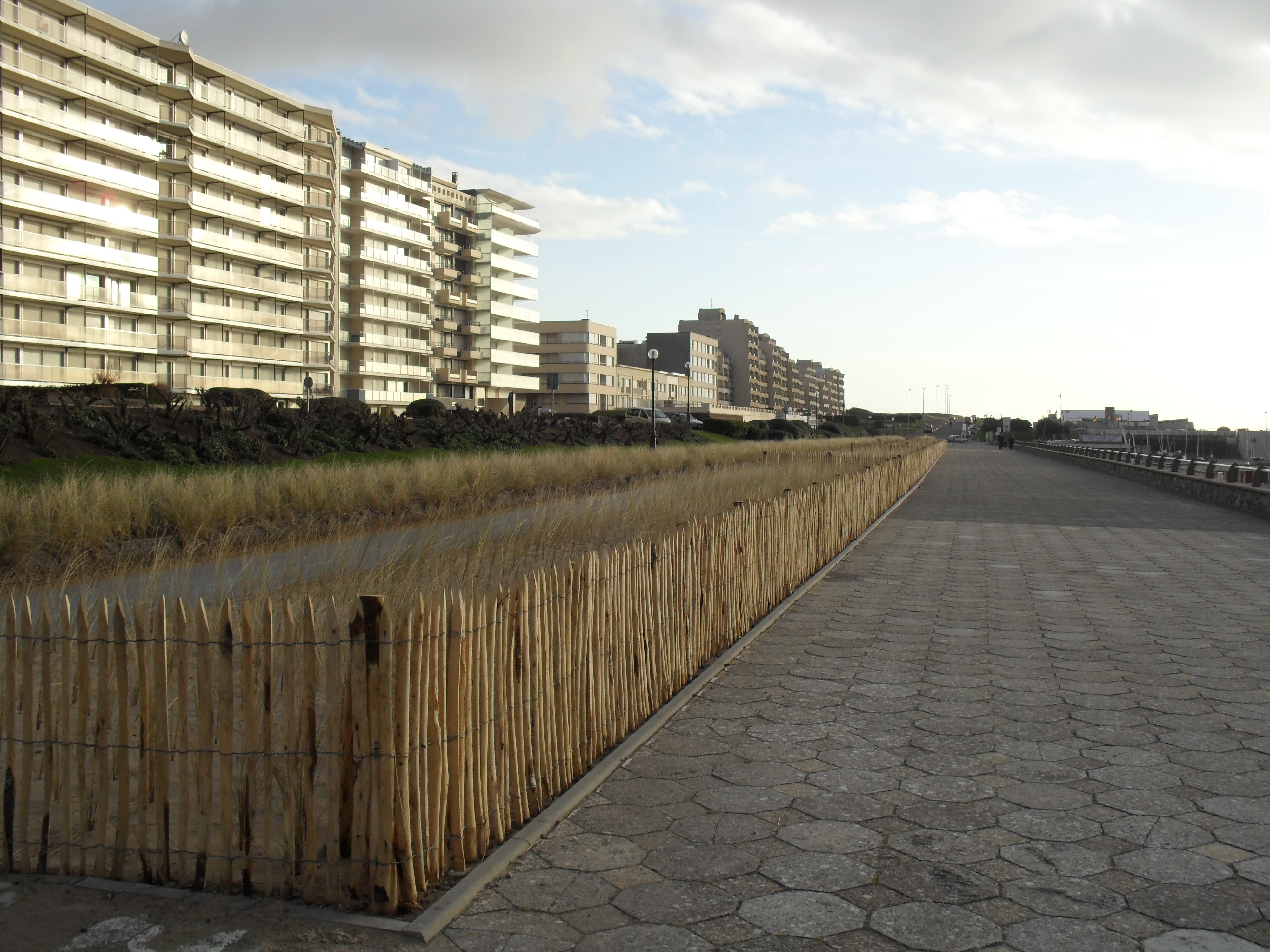 Le Touquet-Paris-Plage - Les oyats de la digue-promenade (3)